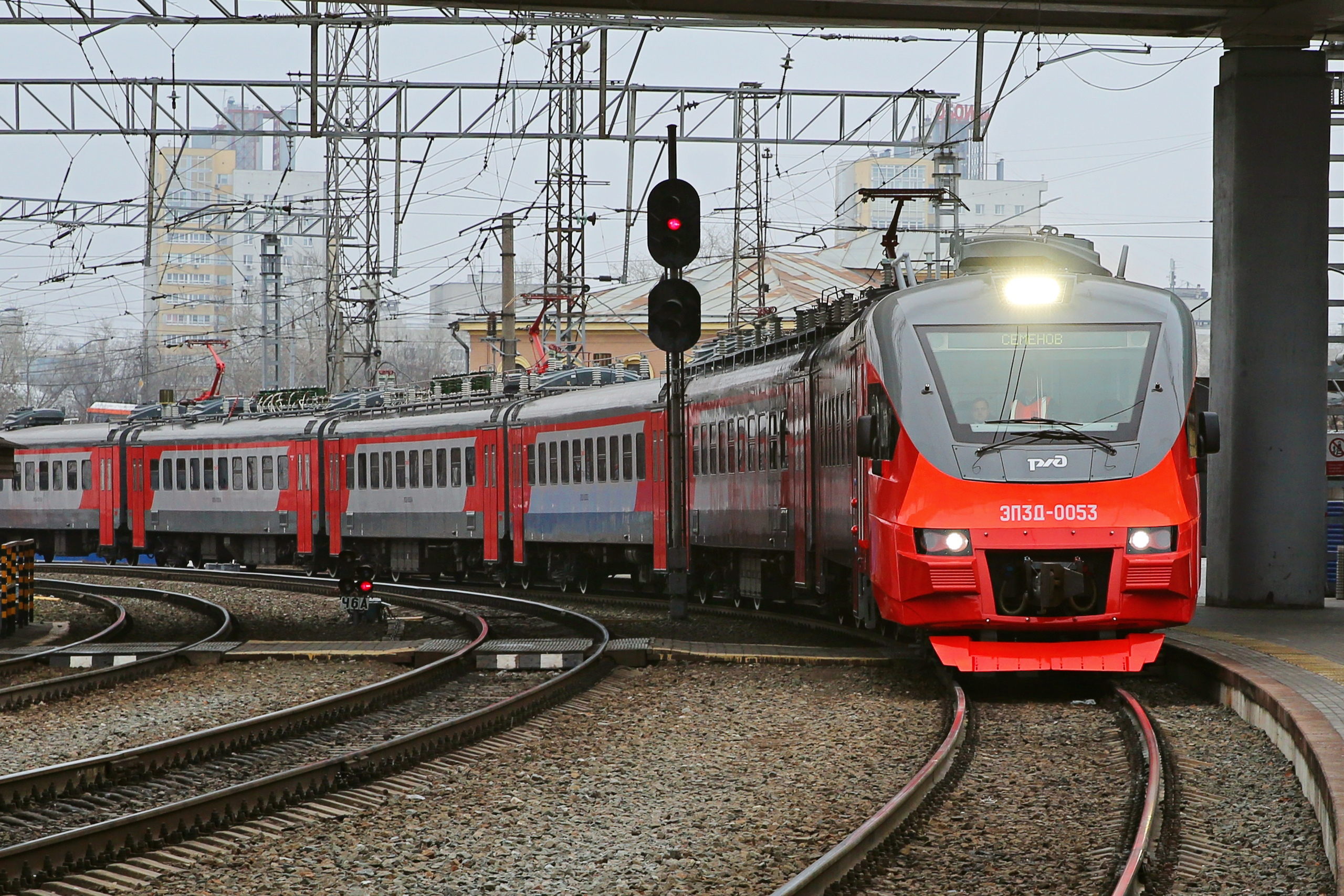 Электропоезд